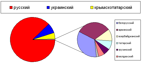 Языковой состав населения Феодосии